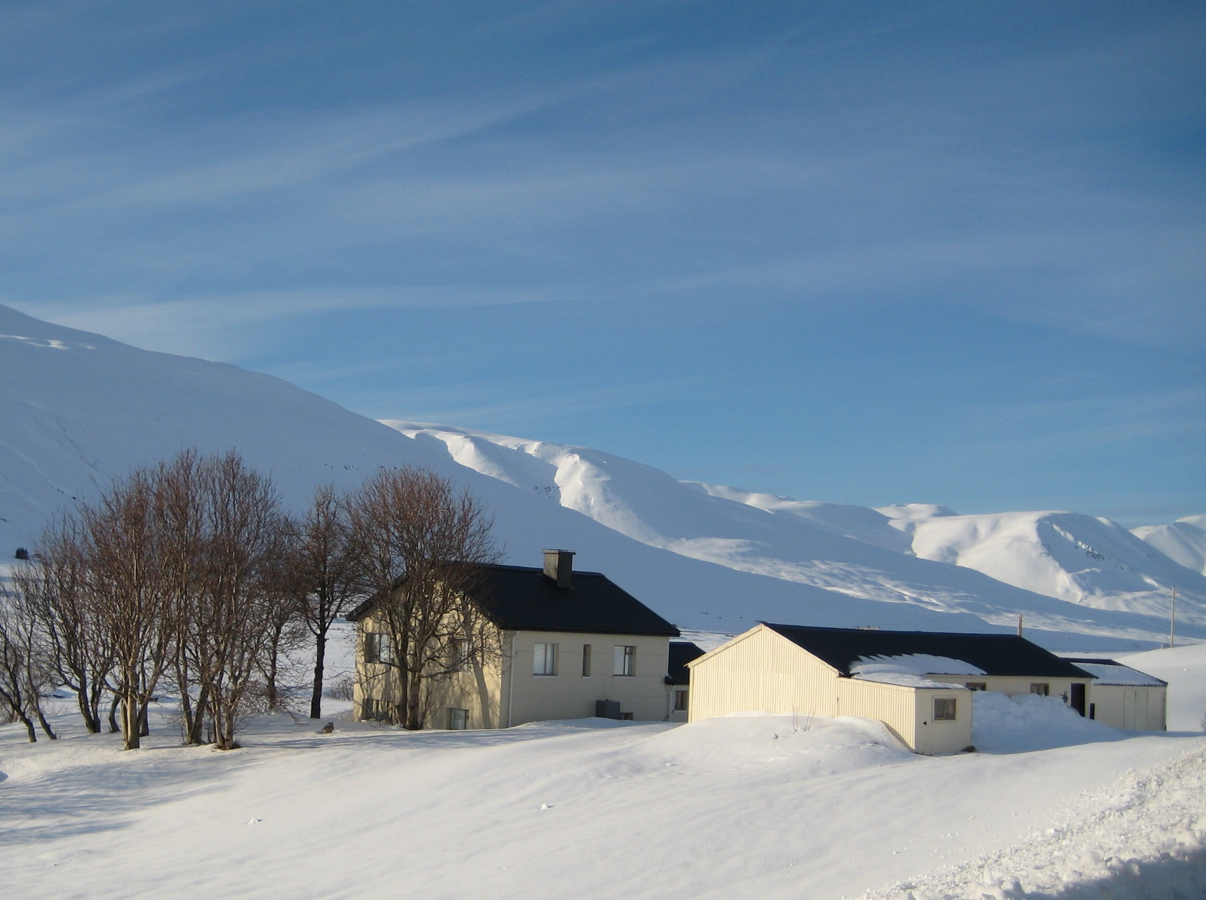 Gröf í Svarfaðardal